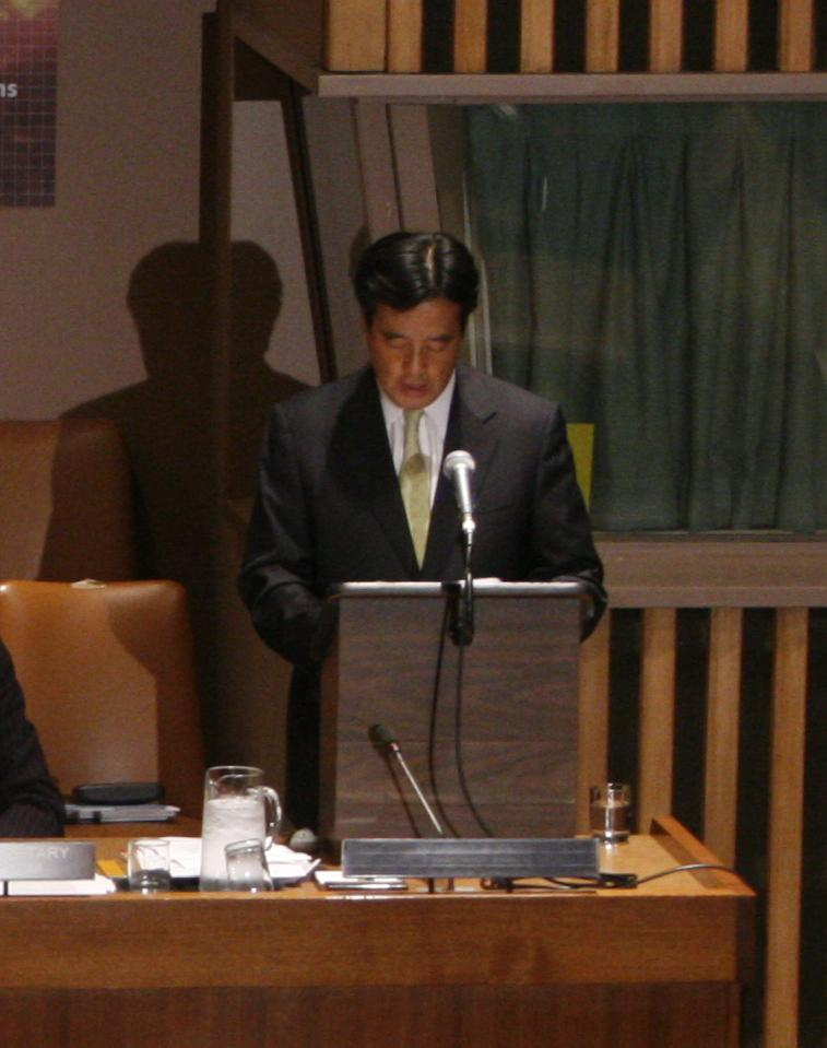 岡田克也